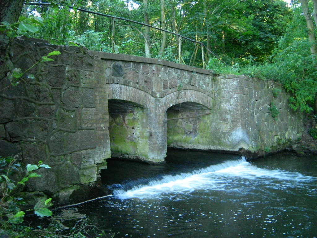 Der Augraben im Wald bei Zachariae (Gemeinde Siedenbrünzow Landkreis Demmin, Vorpommern).